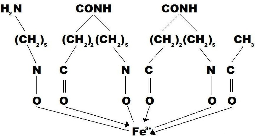 Ferrioxamina. La eliminació del Fe3+ en la ferrioxamina la converteix en deferoxamina.